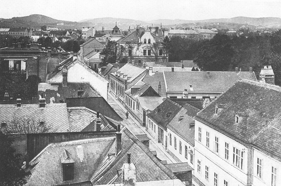 Rudolfinergasse 1910 (Unterdöbling)